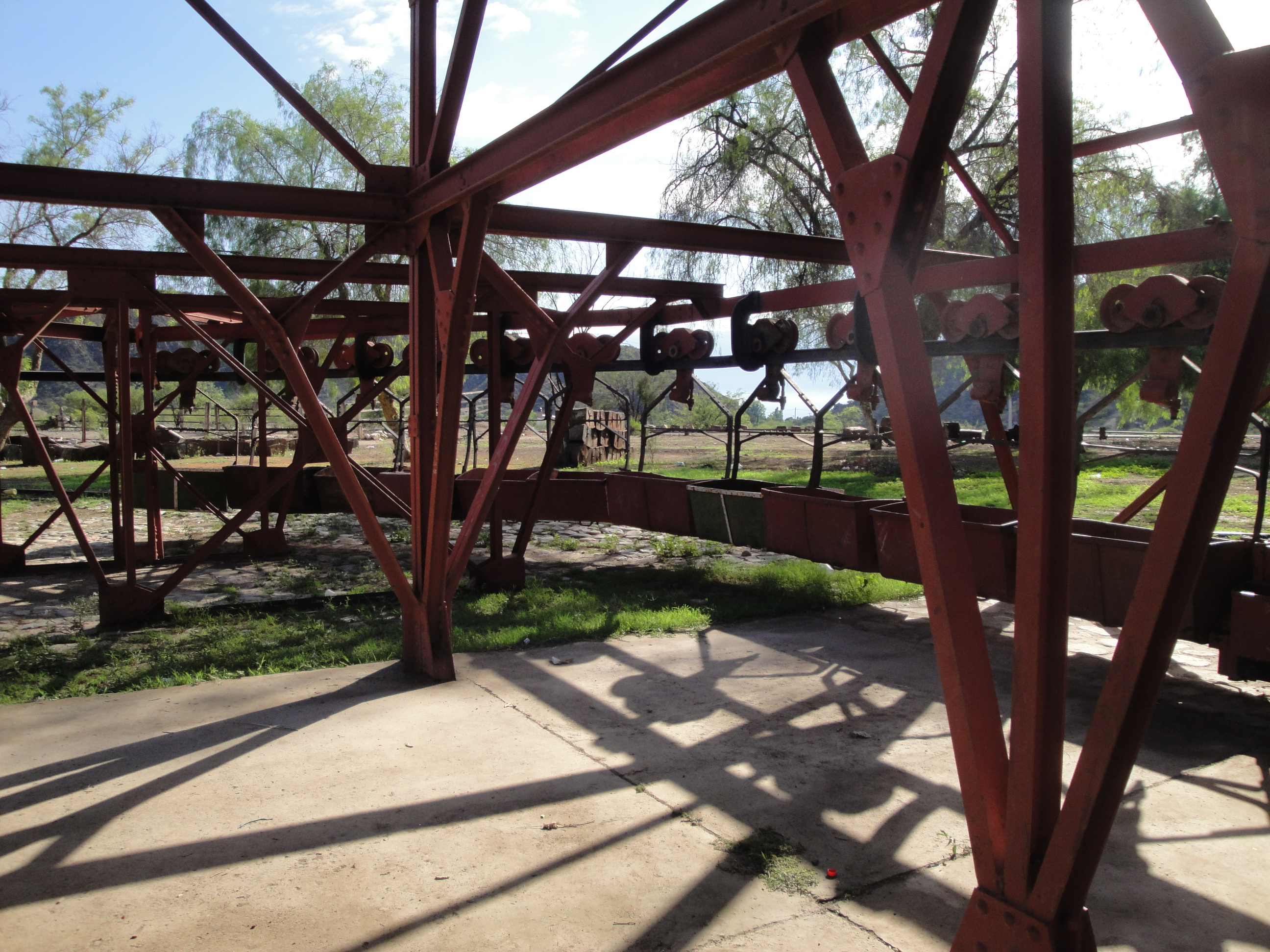 Cable carril de Chilecito La Mejicana